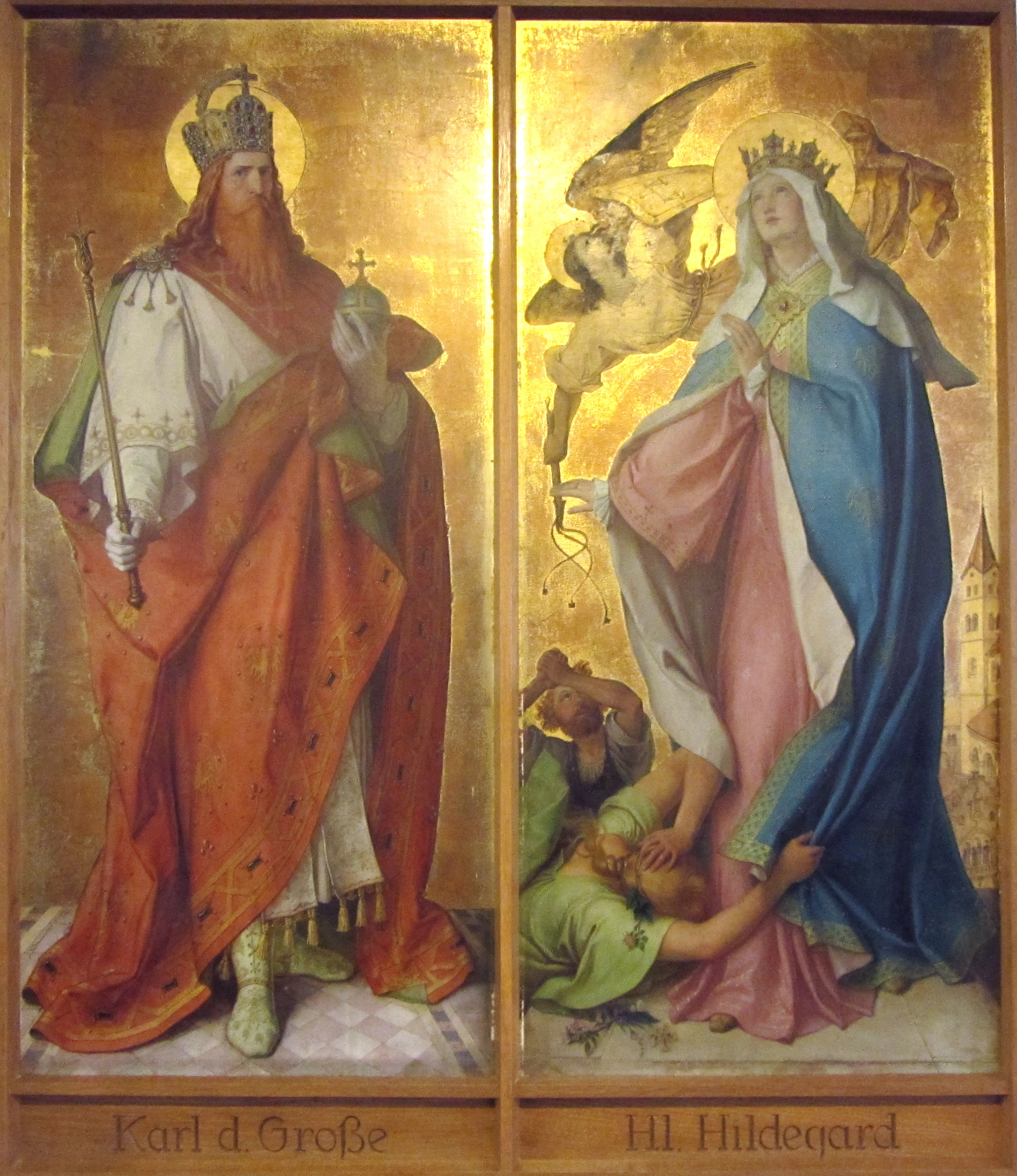 St. Johann Baptist auf dem Bussen, zwei von vier Tafelbildern mit Heiligen, 1895, von Karl Baumeister